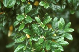 Peumos Boldo (Minimeaceae)